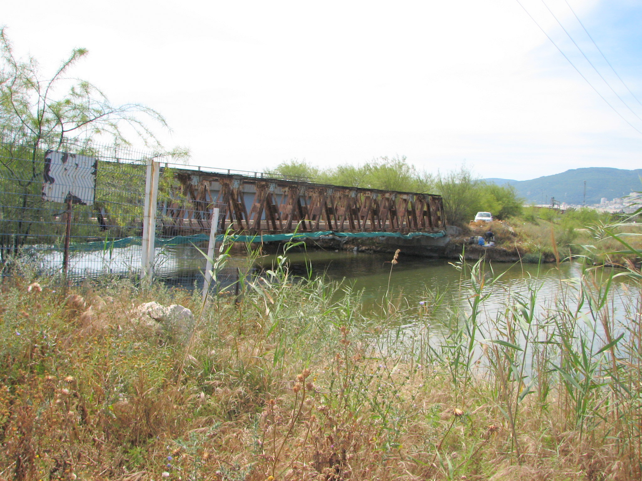 The Kishon River is a river in Israel that flows into the Mediterranean Sea at the city of Haifa.His length is 70 km. נחל קישון זורם מג'נין שבשומרון, לאורך כ-70 ק"מ, דרך עמק יזרעאל, מפער הקישון (המעבר הצר בין הכרמל לגבעות אלונים שפרעם) ועמק זבולון, עד יציאתו לים במפרץ חיפה. בשפך הנחל נמצא נמל הקישון. שטח אגן הניקוז שלו הוא השני בגודלו מבין נחלי החוף, כ-1,110 קמ"ר ולאורך חלק ניכר מאפיקו זרימתו איתנה. הנחל סבל מזיהום רב במיוחד באפיקו התחתון. בתחילת שנות ה2000 עבר הנחל שיקום באמצעות רשות נחל קישון והדגה והעופות חזרו לנחל פארק הקישון הגשר הישן